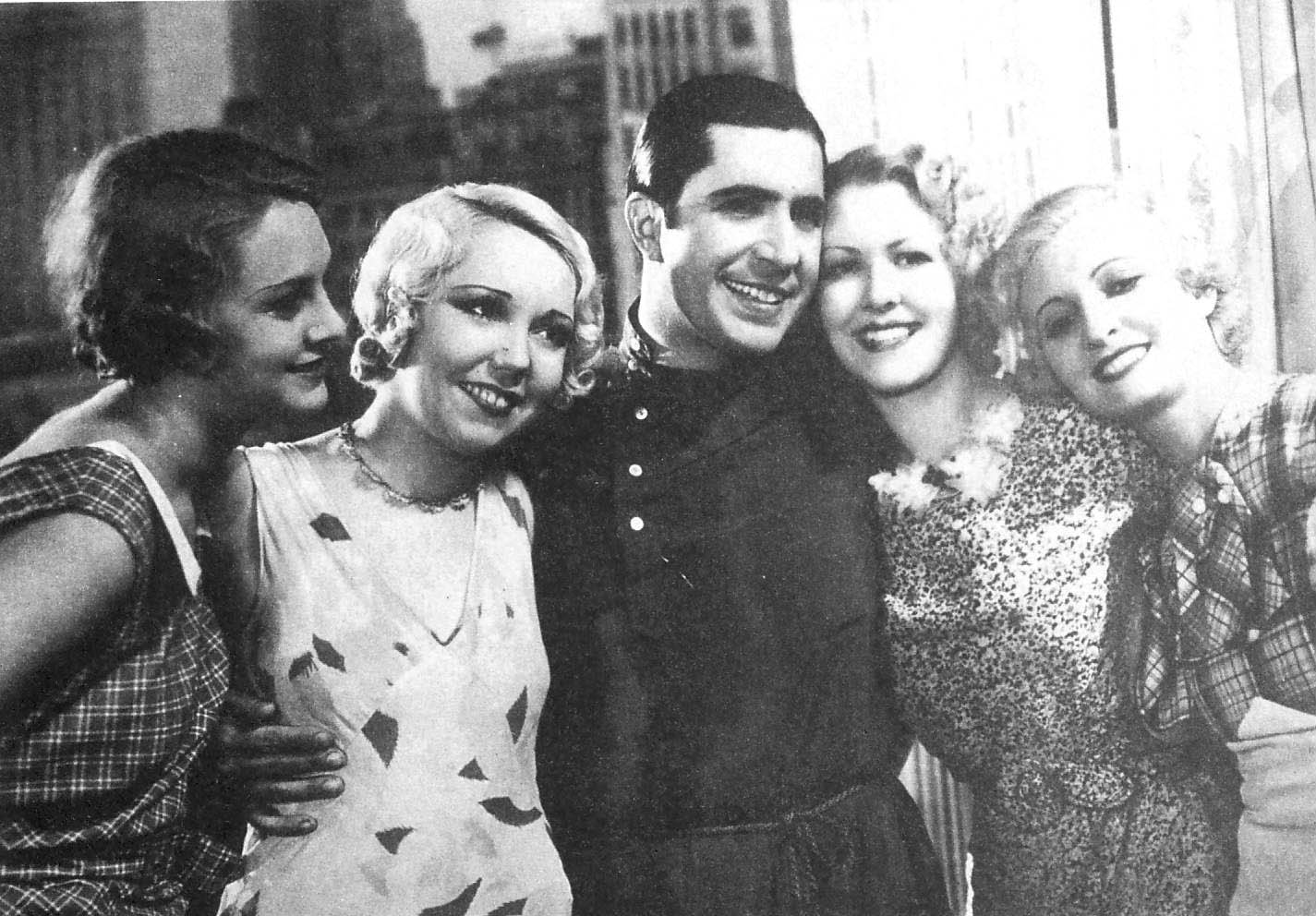 Rodaje de la película "Rubias de New York".